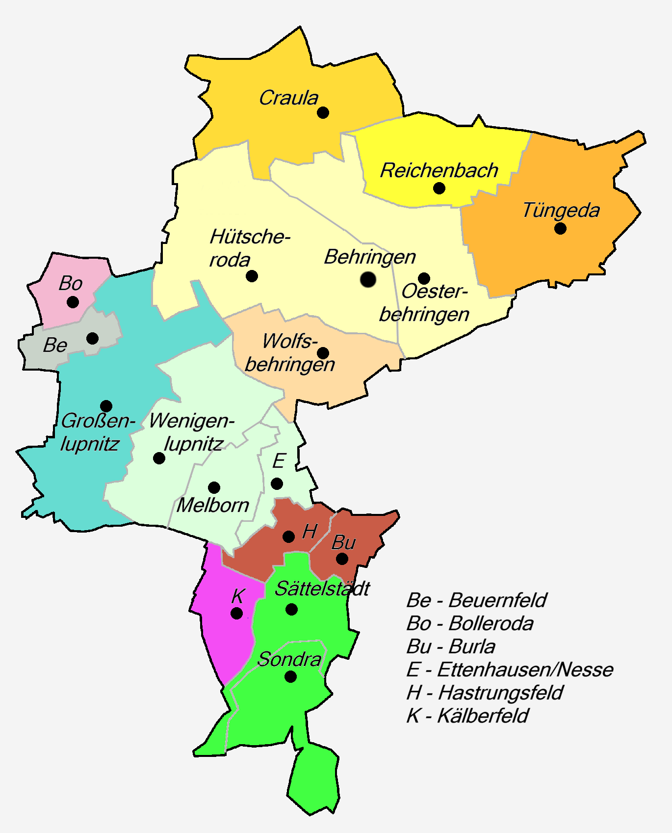 Entwicklung des Ortes im Jahr 1994.